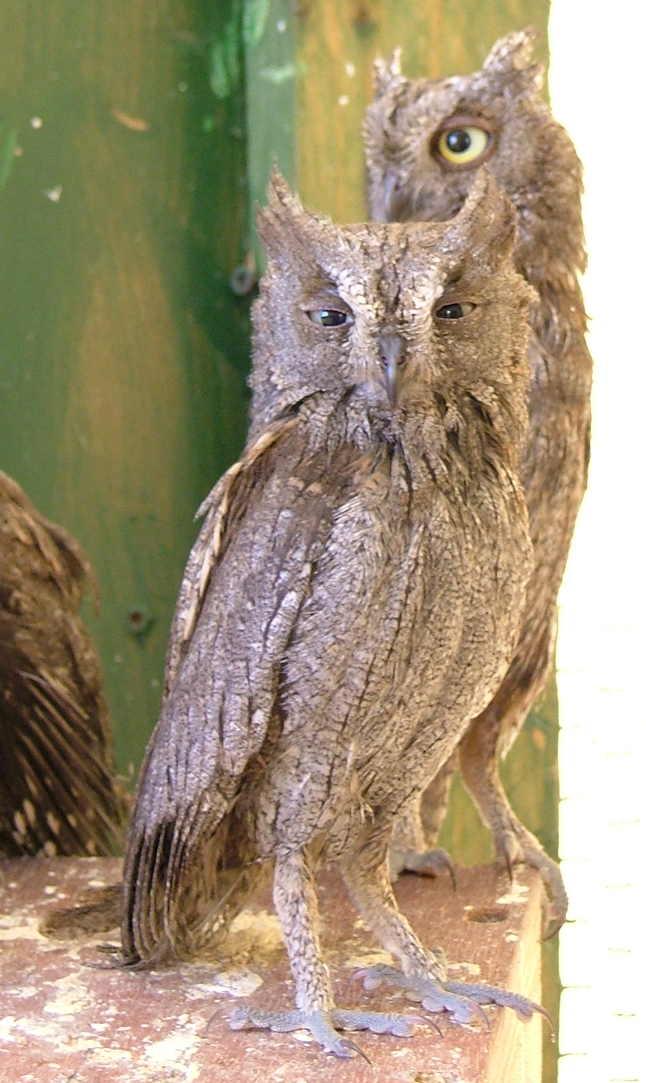 Otus scops in Ekpaz, Aegina, Hellas